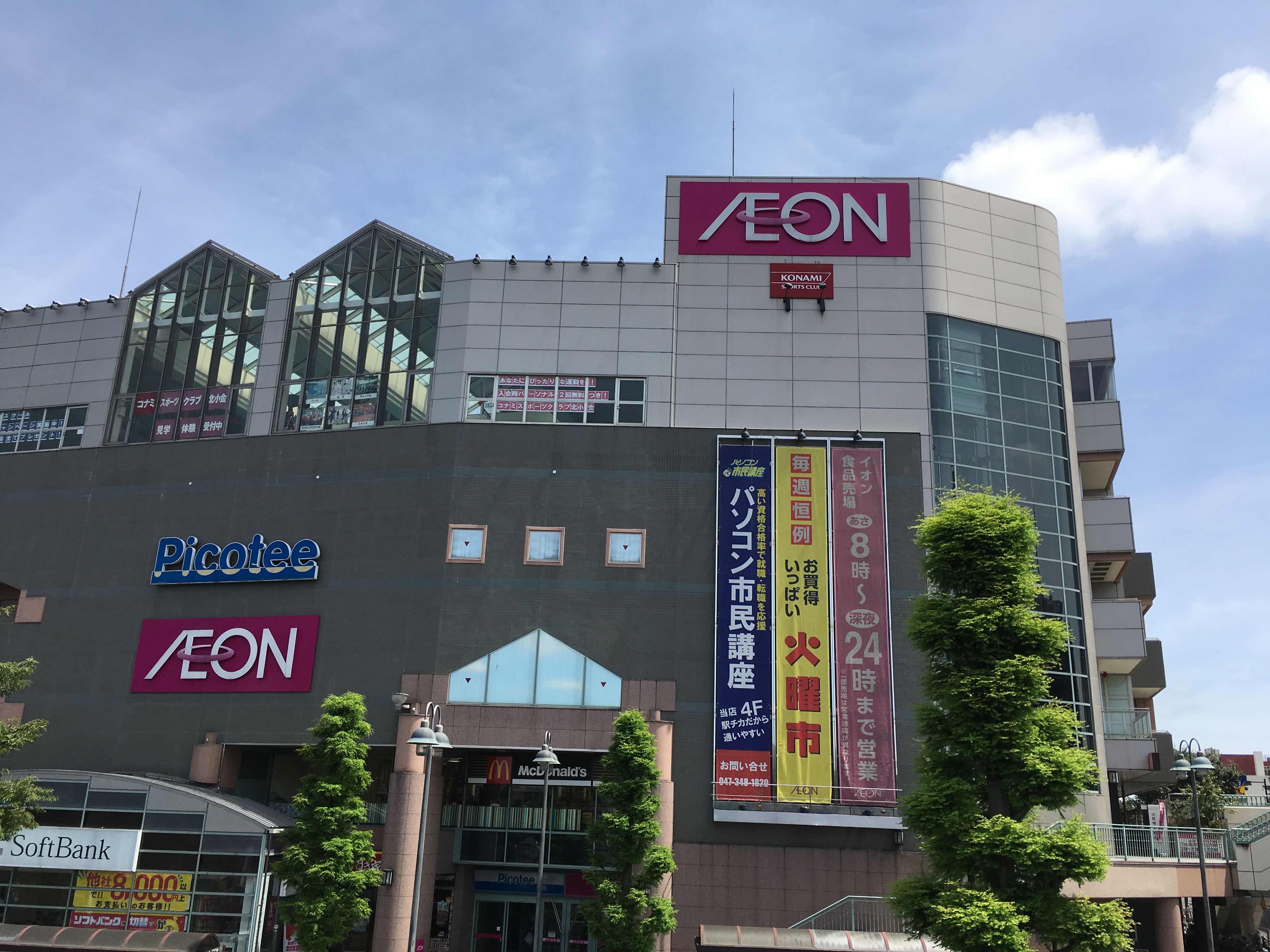 松戸市北小金 ピコティー東館